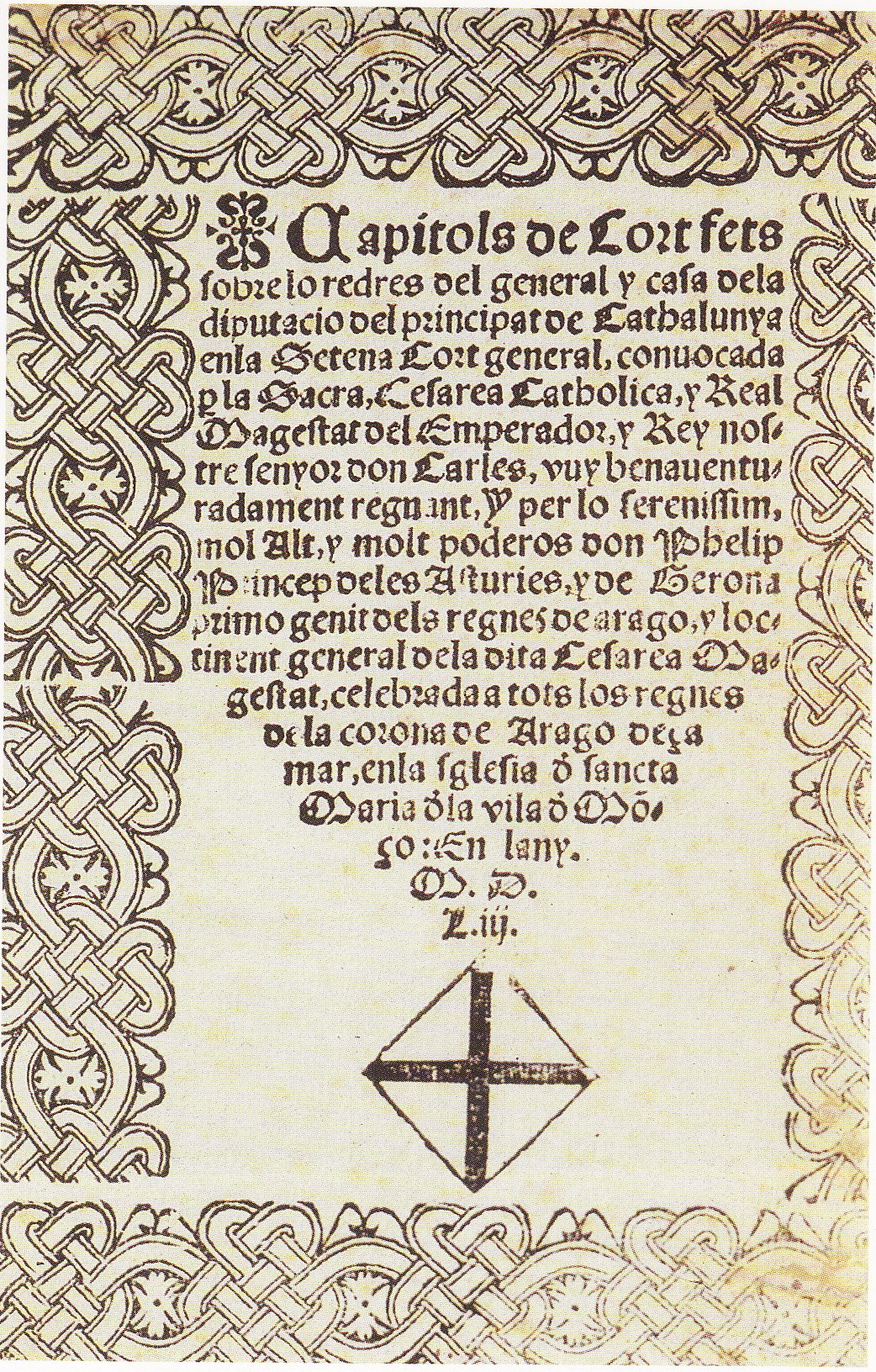 Constitucions, capítols i actes de Cort de les Corts de Barcelona de 1552-1553 presidides per Carles V del Sacre Imperi Romanogermànic (Carles I d'Espanya).